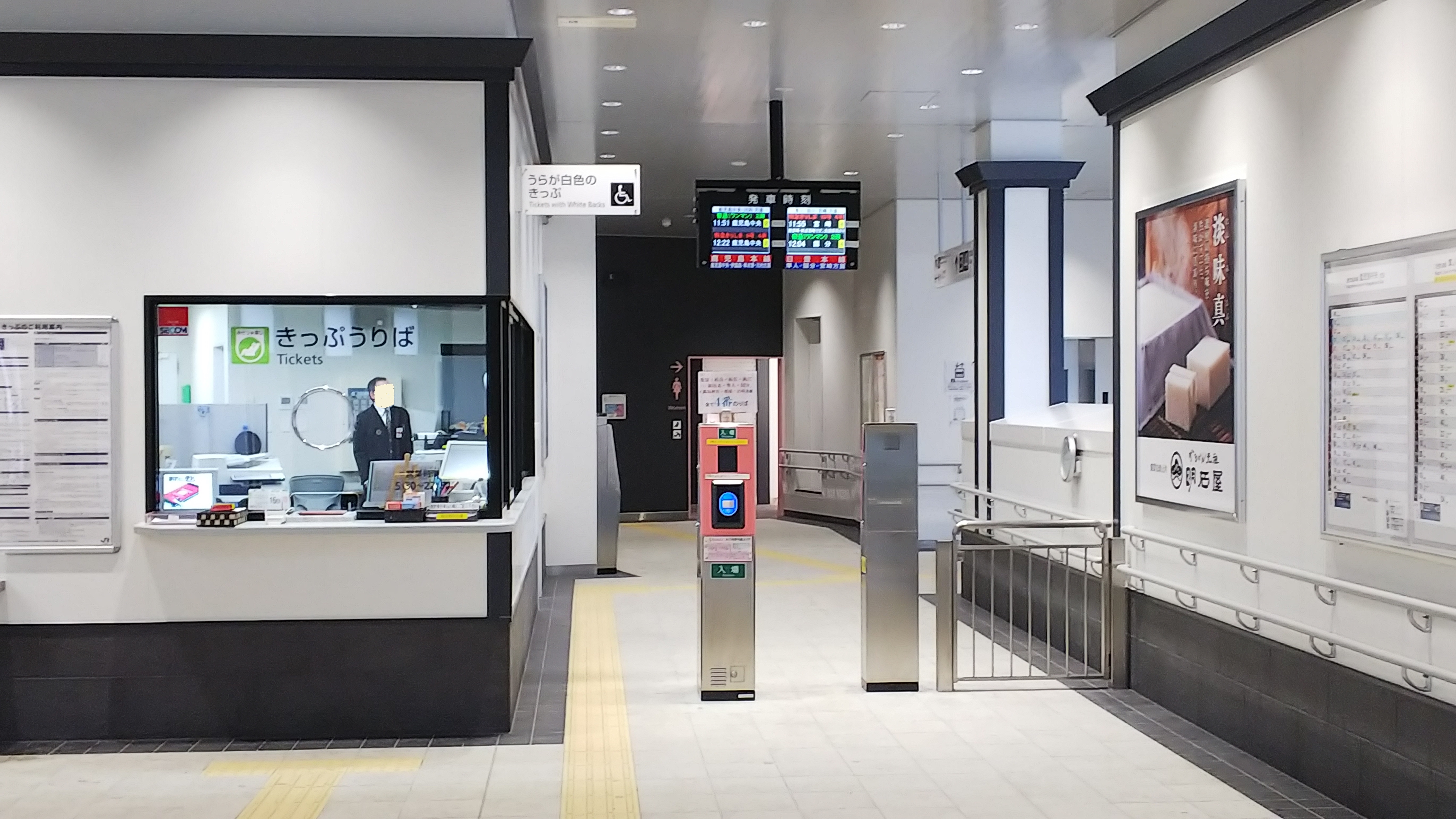 鹿児島駅改札口